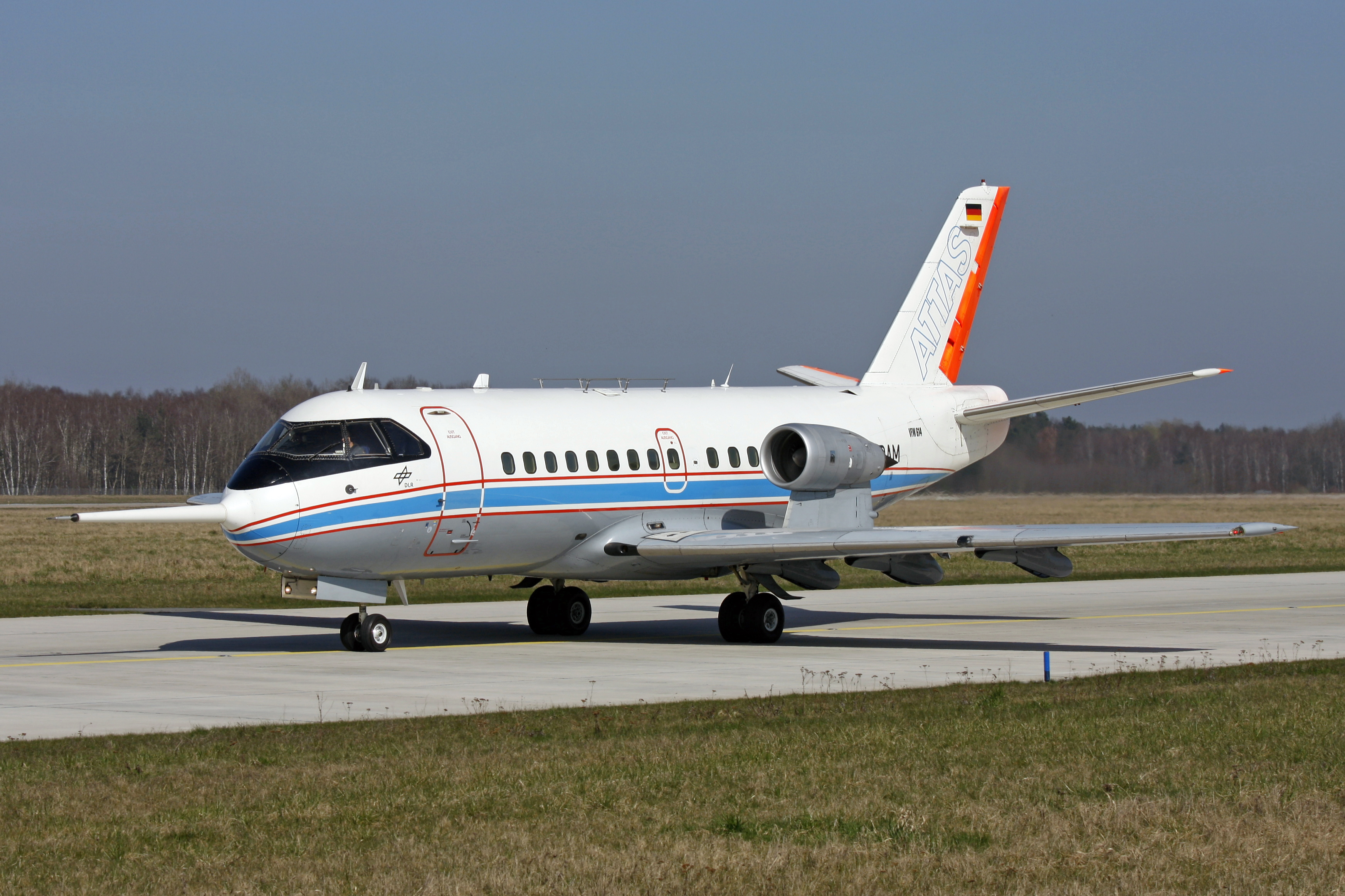 Haj / Eddv 03-04-09